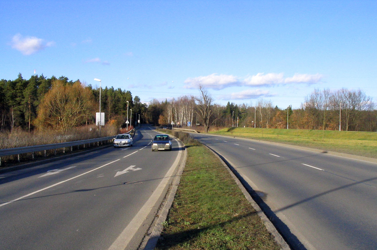 Silnice I/27 vedoucí po hrázi Třemošenského rybníka na severním okraji Plzně.